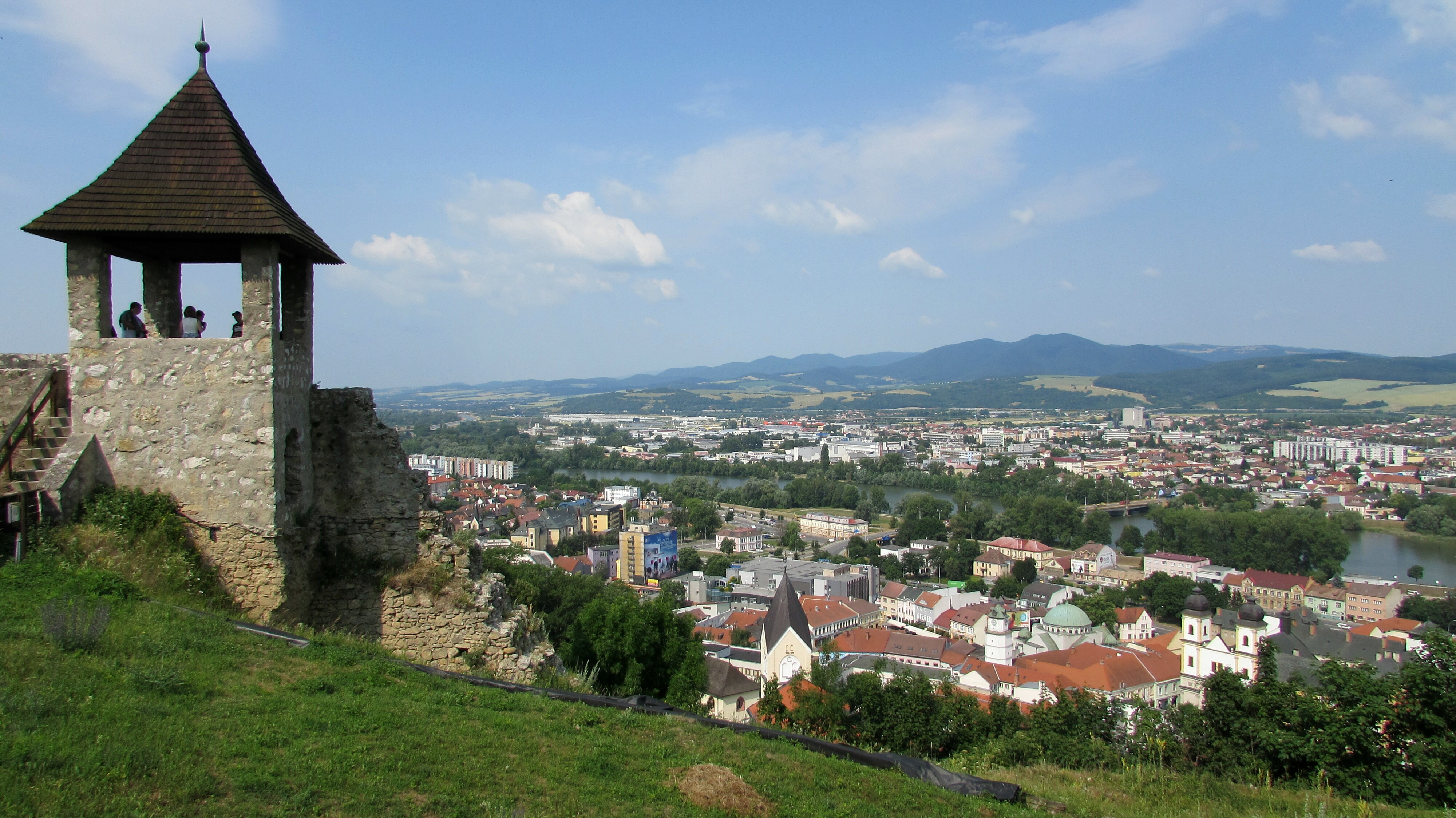 Trencin Ansicht-4